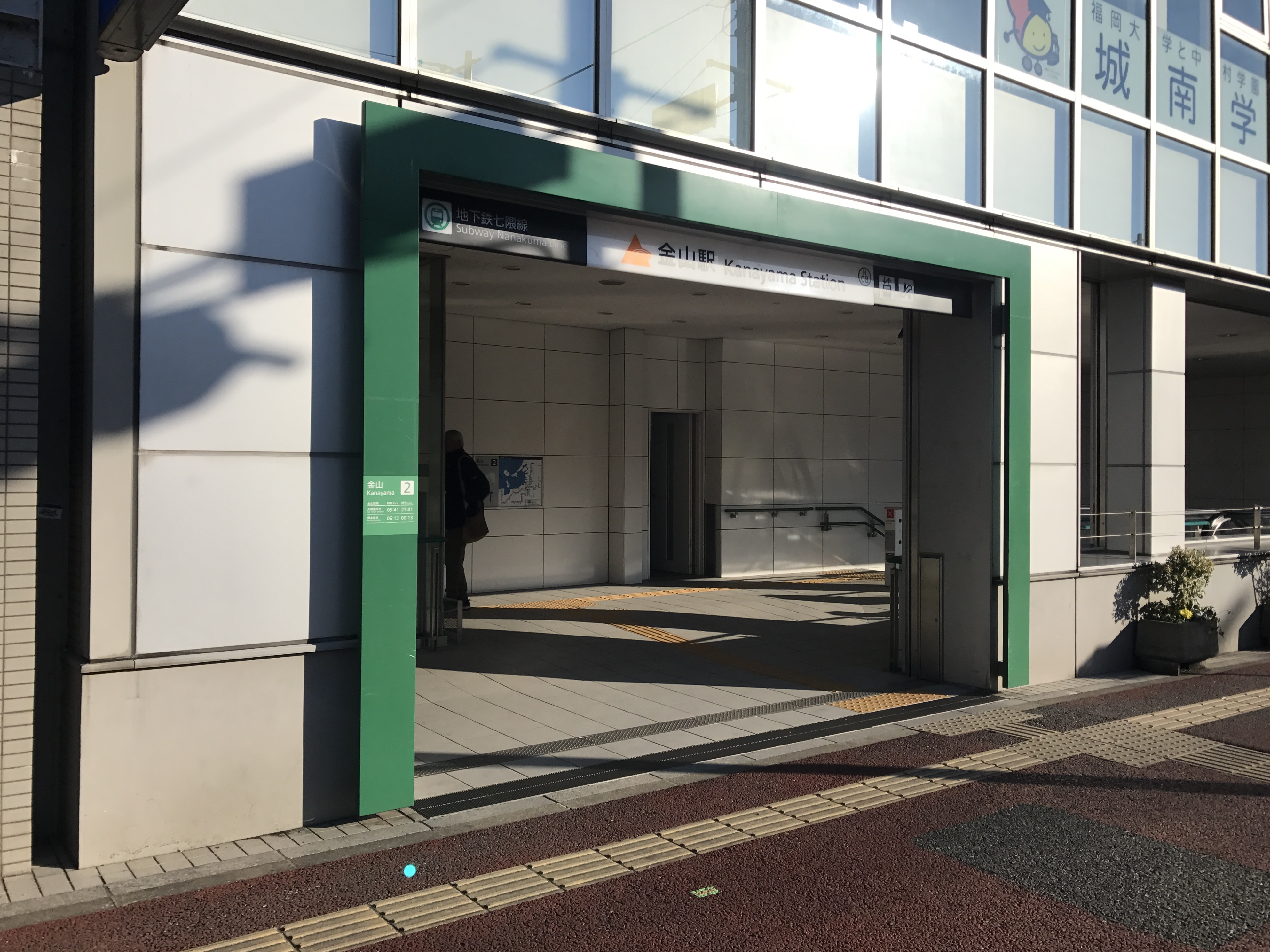 金山駅(福岡市営地下鉄)の2番出入り口